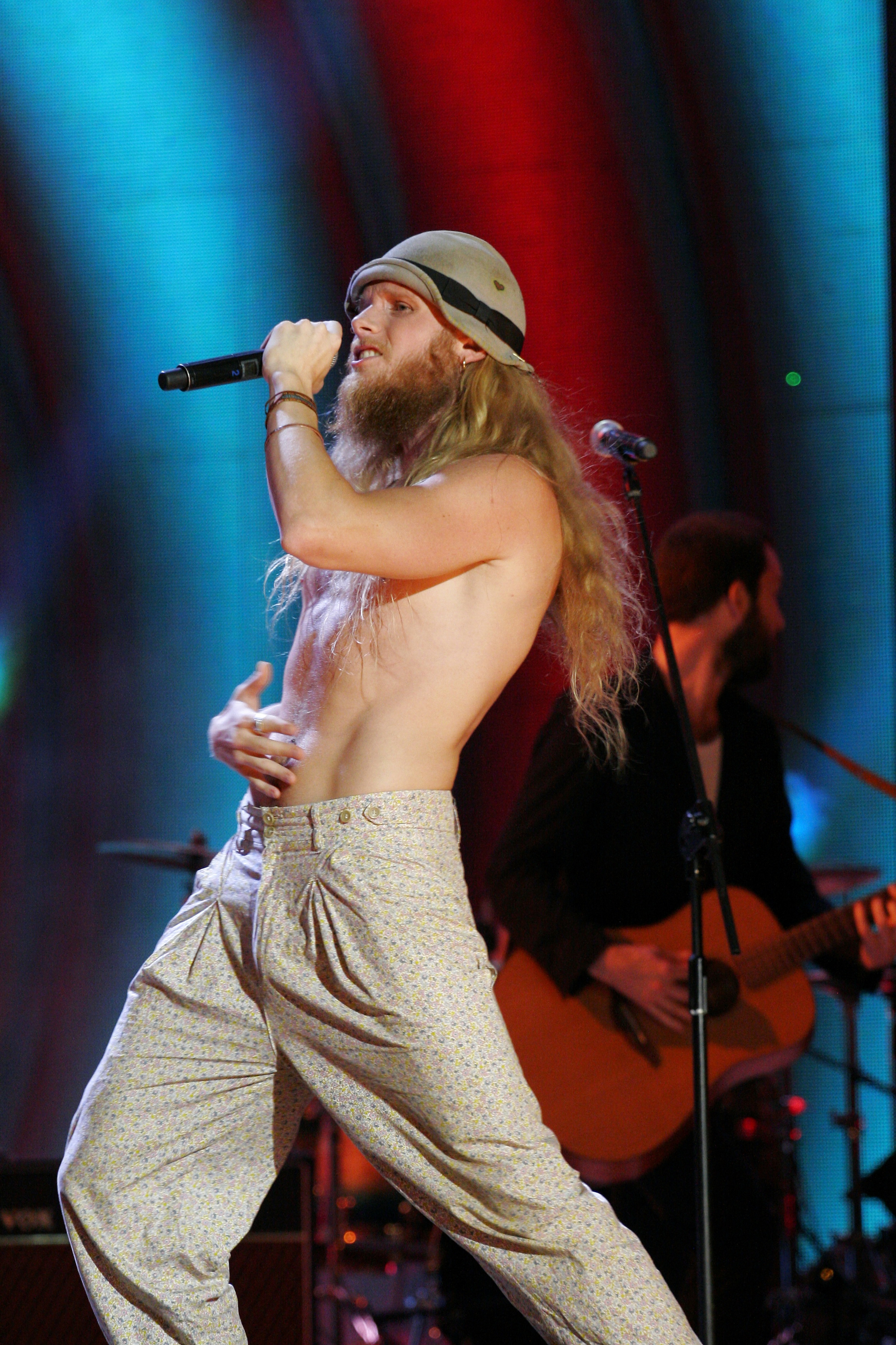 Johan Stattin (The SOL/Stat & Orchestra Live) na koncercie "Lato Zet i Dwójki" w Bydgoszczy